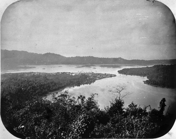 Foto. Gezicht op de Banda eilanden